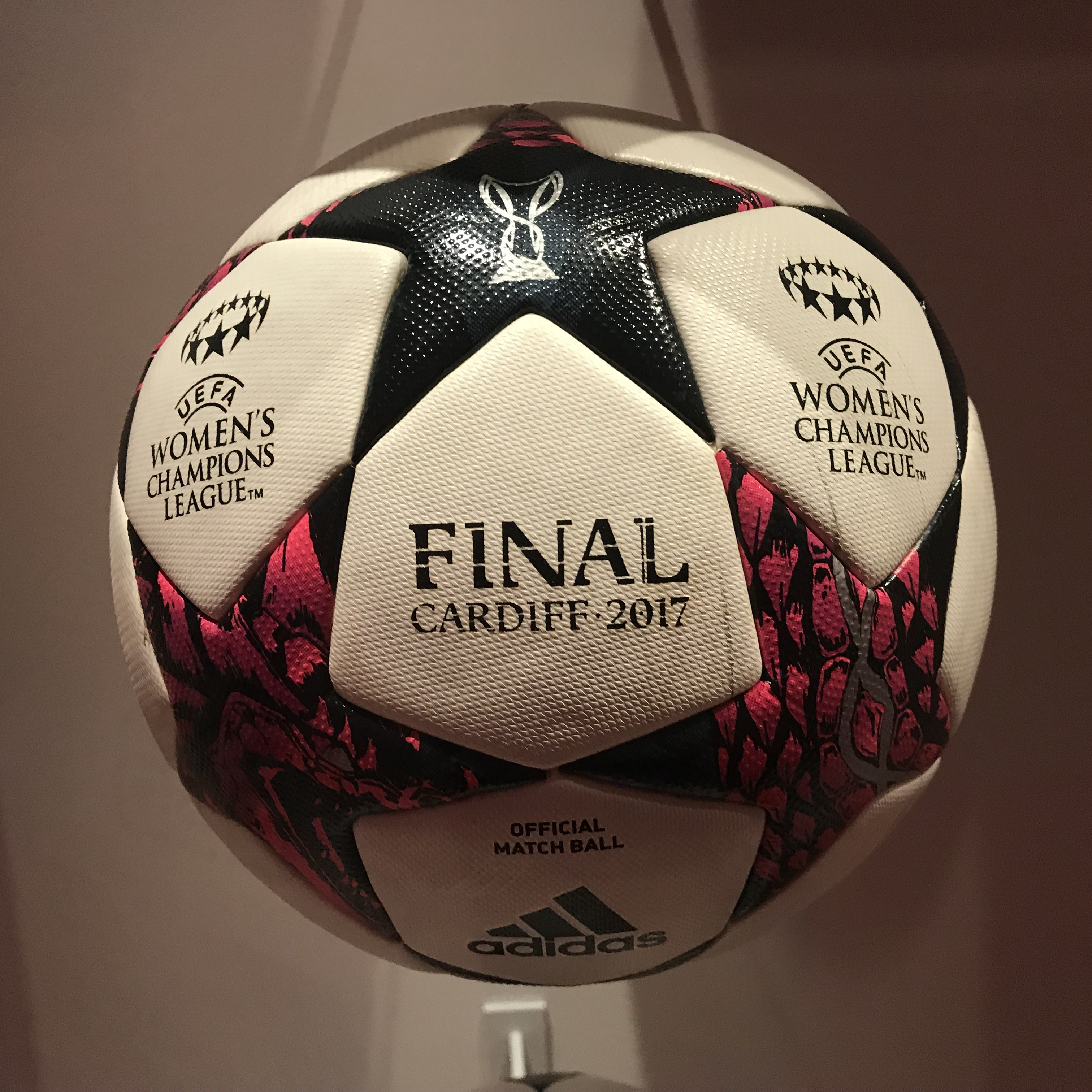 OL Le Musée au Parc OL.